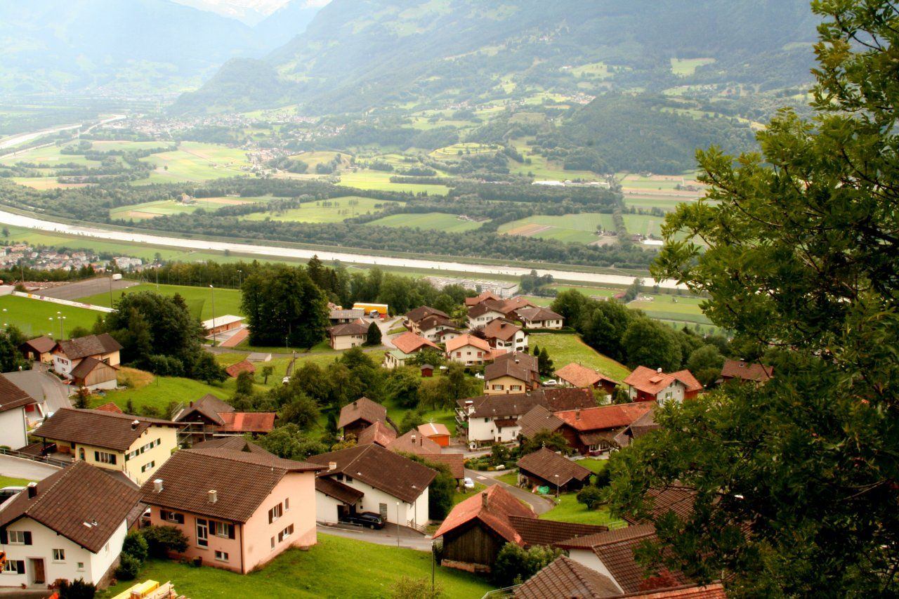 Rhein over Triesenberg town in Liechtenstein.